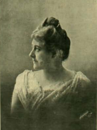 Retrato de María Luisa Isella Solari, en la revista Zig-Zag.